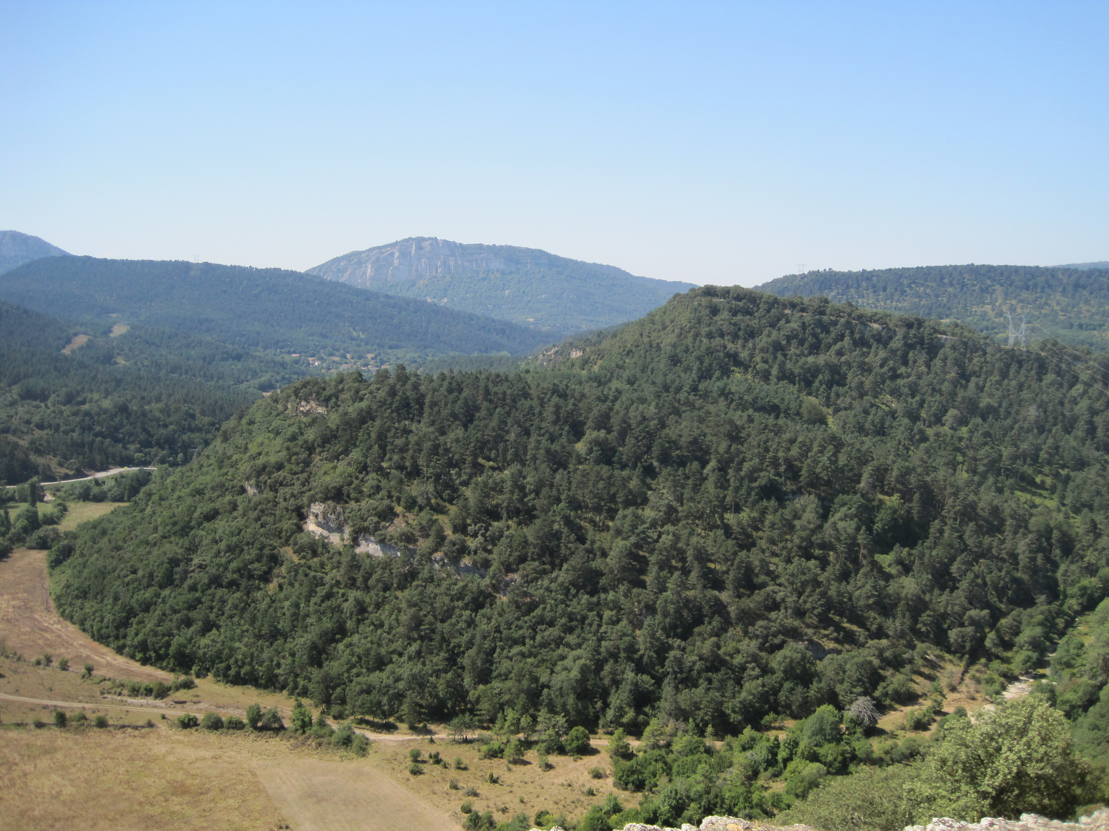 Vista del entorno de San Pantaleón de Losa.